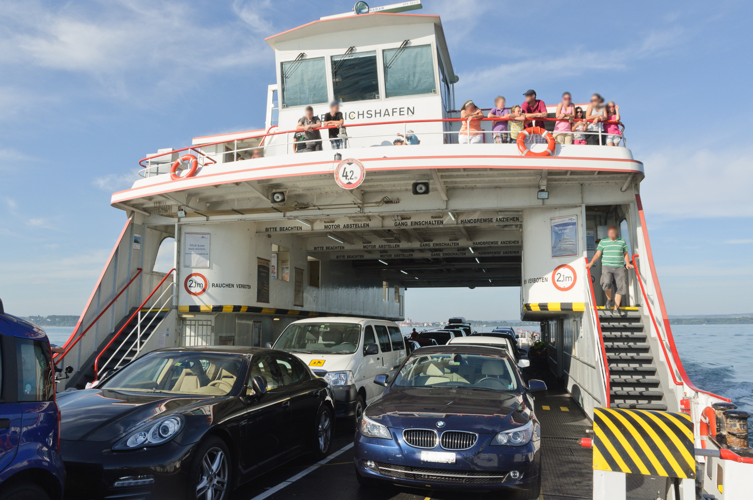 Hauptdeck (Autodeck) der Bodenseefähre Friedrichshafen